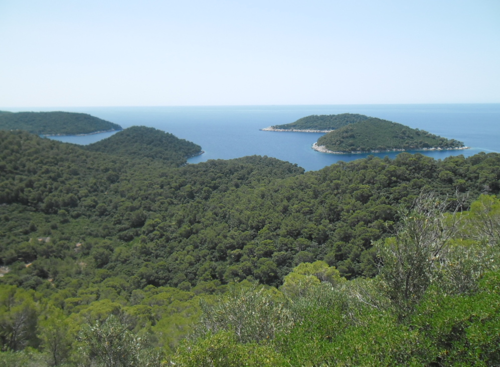 otok Lastovo